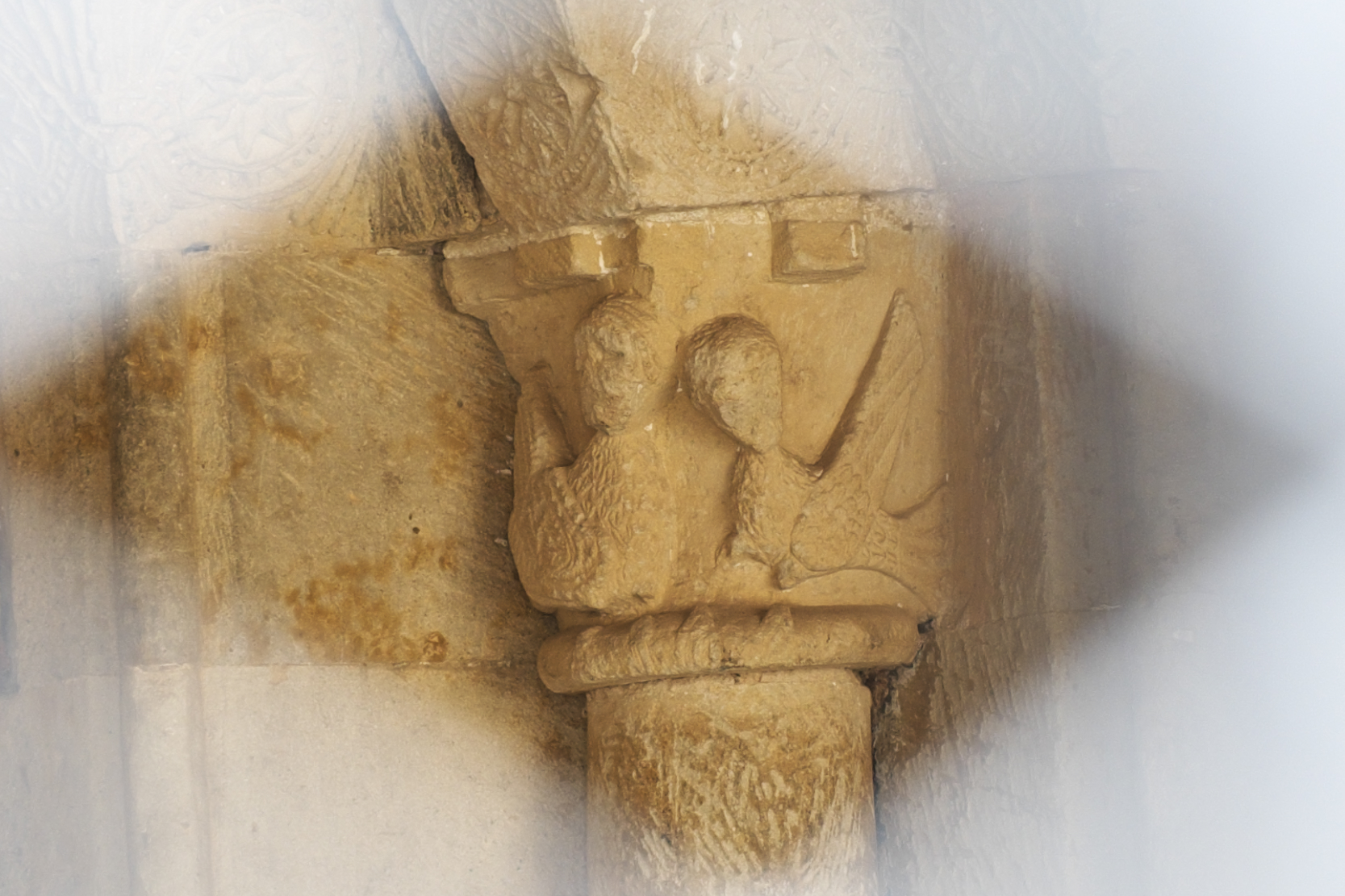 Kirche Santa María in Almenara de Tormes in der Provinz Salamanca Provinz Salamanca (Kastilien-León/Spanien), aus dem 12. Jahrhundert, Kapitell am Südportal